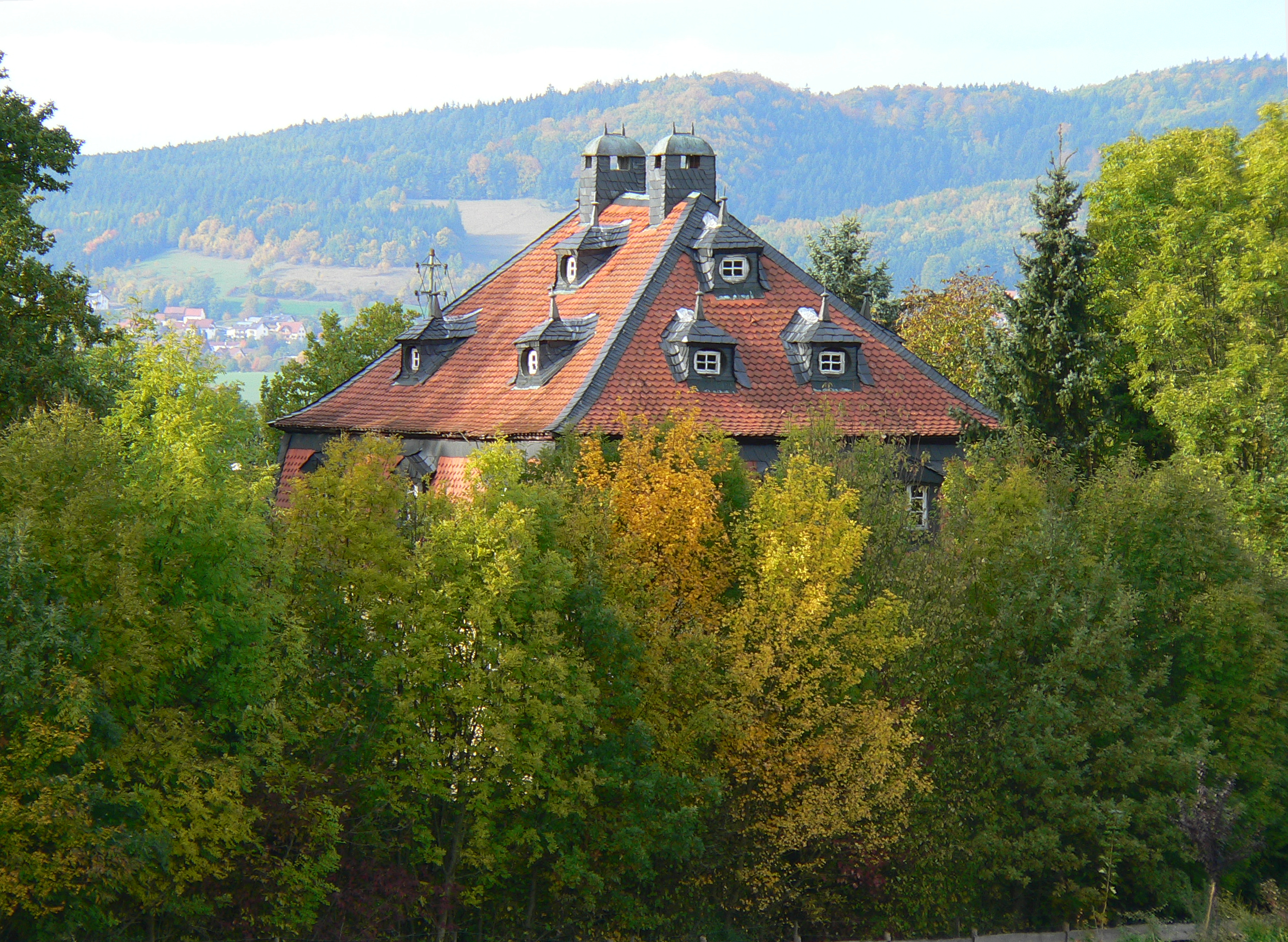 Schloss in Küps-Hain, Bayern, Regierungsbezirk Oberfranken, Landkreis Kronach